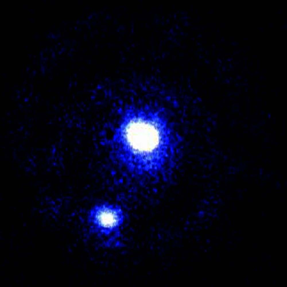 Filipino: Ang imahe ng Pluto at Charon bilang nakita mula sa Hubble teleskopyo noong 1990.